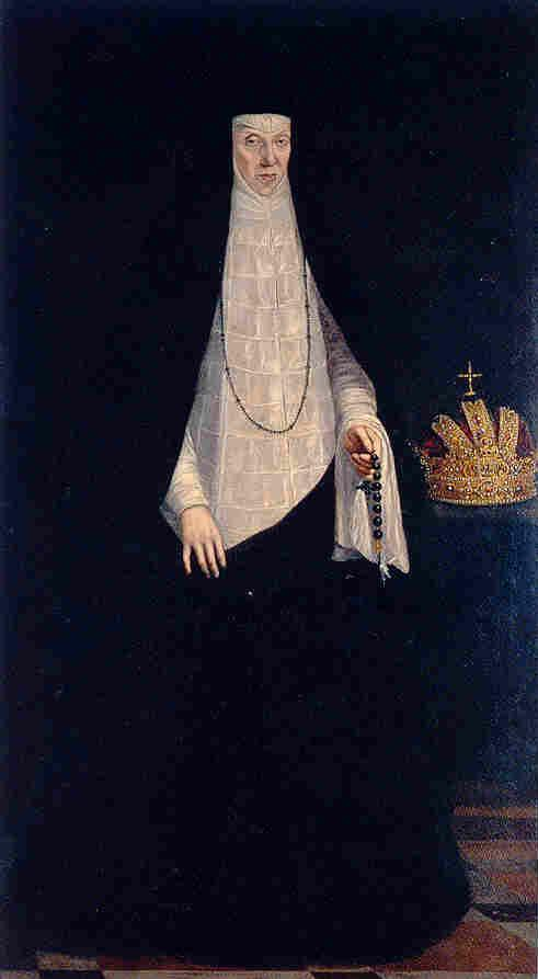 Retrato de la emperatriz María de Austria (1528-1603), que fue hija del emperador Carlos I de España y de Isabel de Portugal y esposa de Maximiliano II de Habsburgo, emperador del Sacro Imperio Romano Germánico.